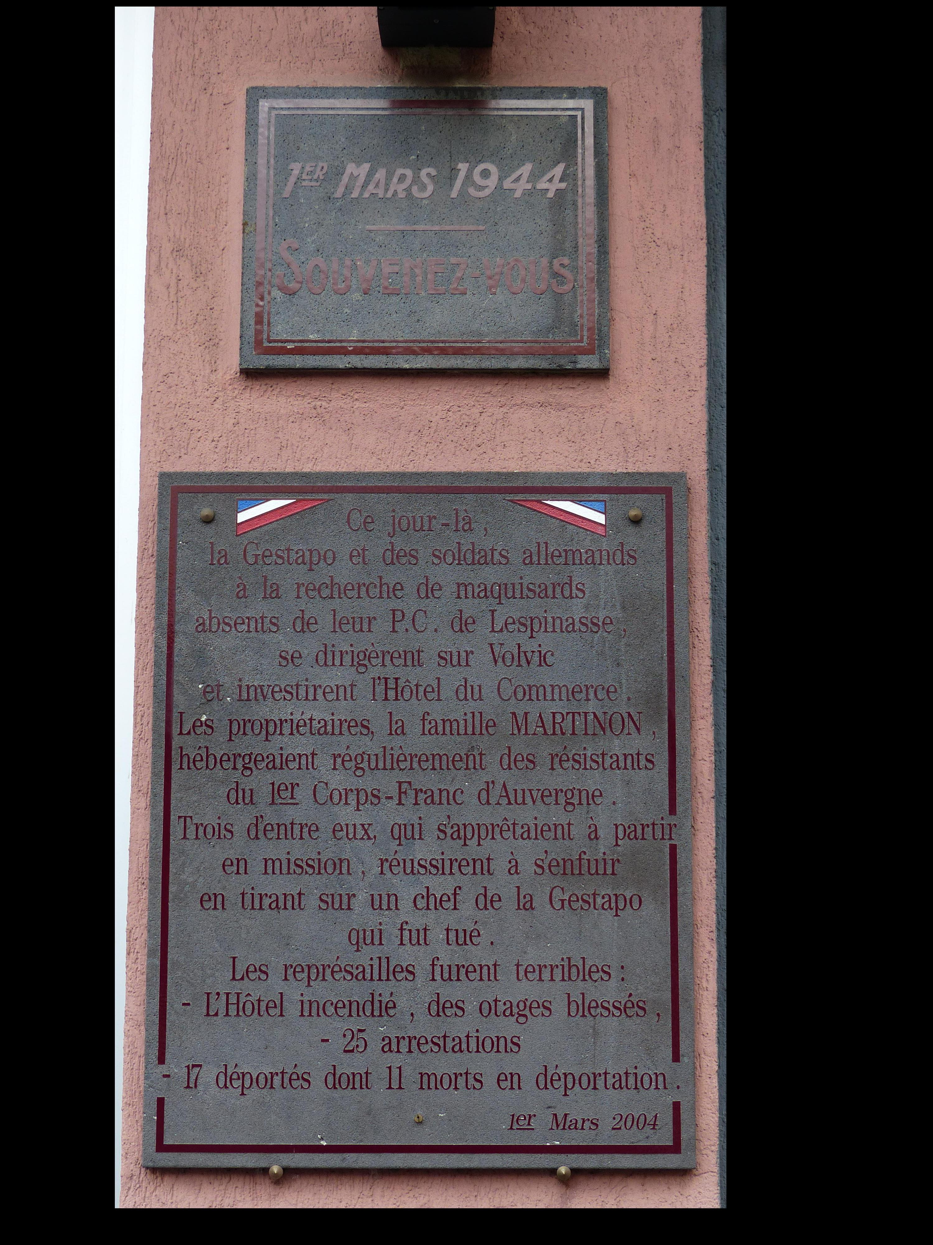 Plaque sur l'hôtel du Commerce, Grande Rue à Volvic (Puy-de-Dôme). Elle commémore la rafle du 1er mars 1944.